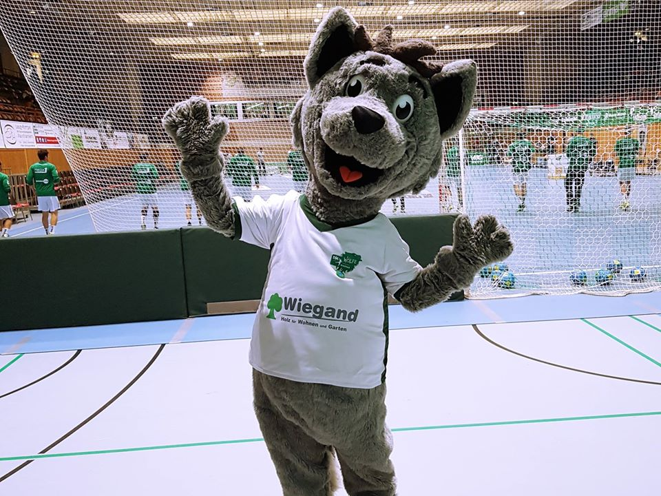 "Lupo", Maskottchen der DJK Rimparer Wölfe